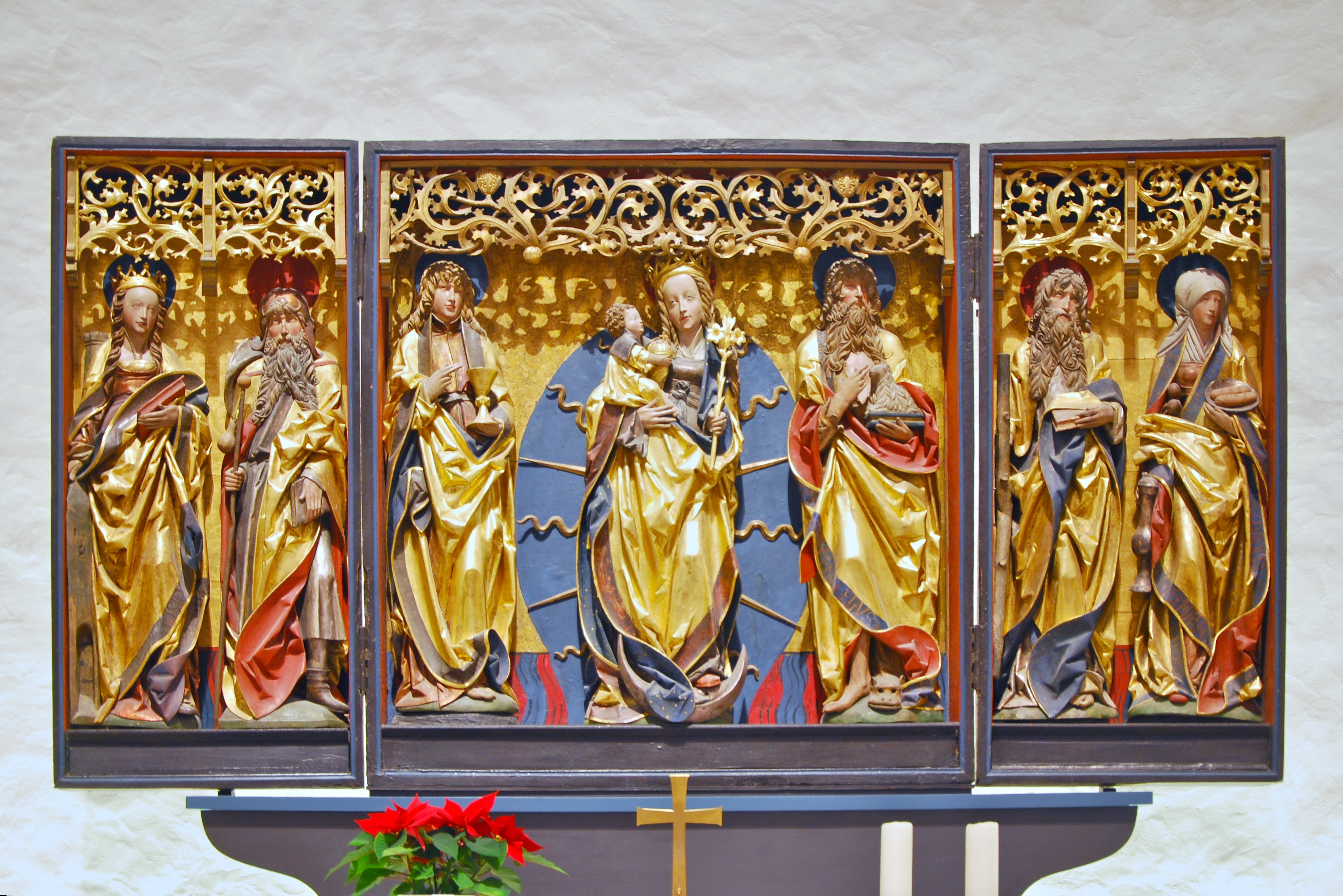 Johannesaltar in St. Michael (Hildesheim)